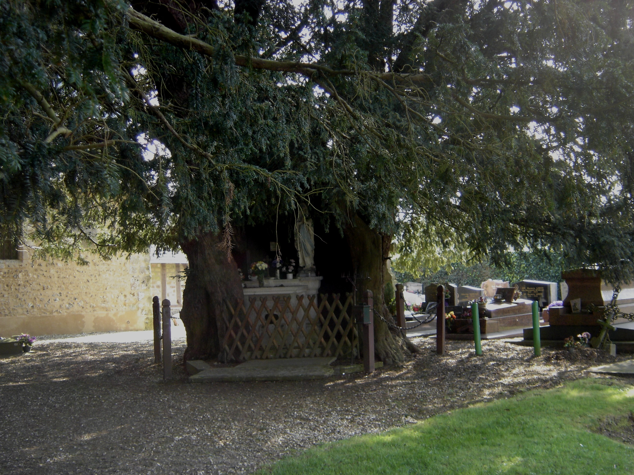 If millénaire à La Haye-de-Routot - Eure - France avec Chapelle ND de Lourdes, circonférence 14m. Les deux ifs de La Haye-de-Routot ont reçu le label « Arbre Remarquable de France » en juillet 2001.